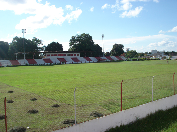 Estádio José de Melo em Rio Branco, capital do Acre